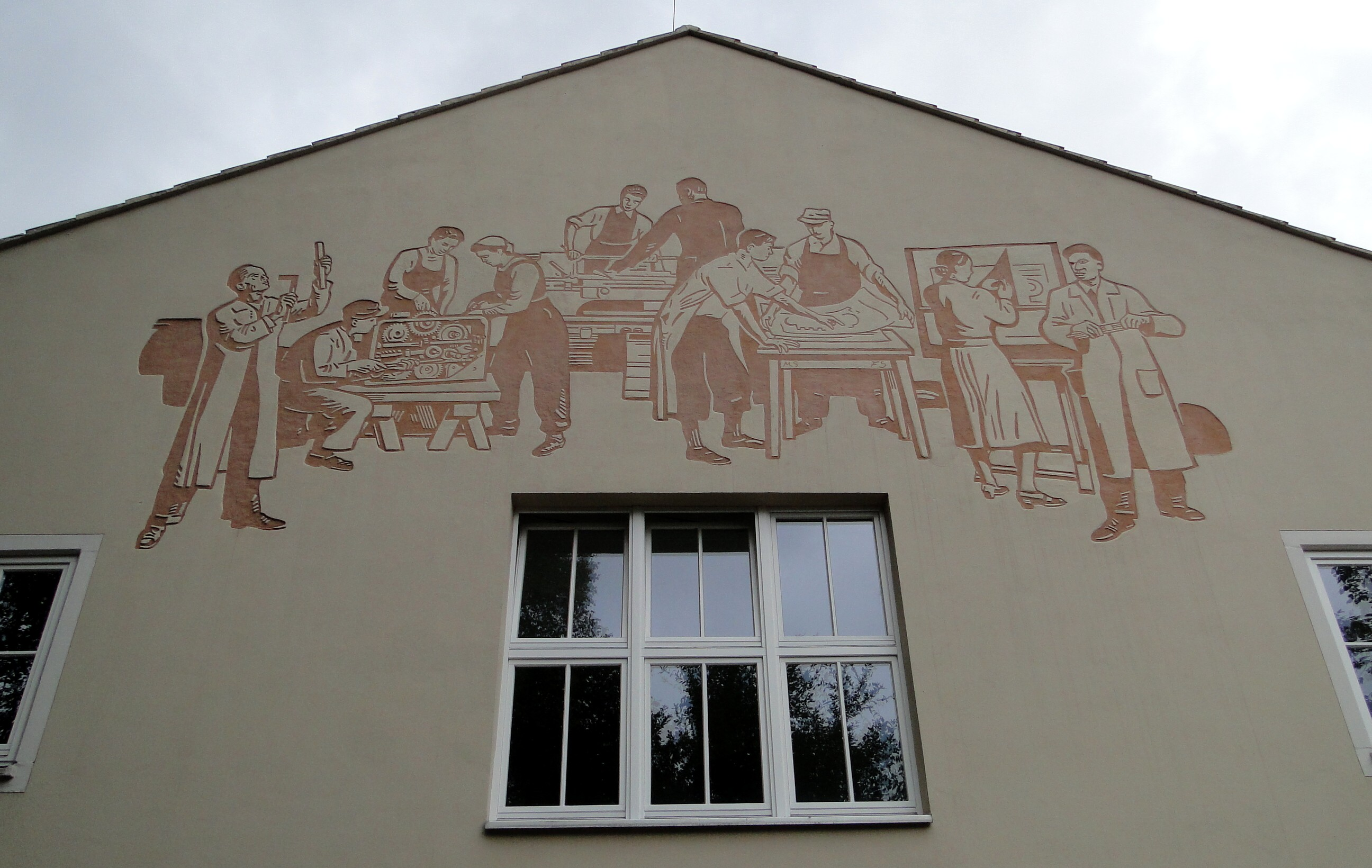 Giebeldetail an einem Studentenwohnheim am Zelleschen Weg in Dresden